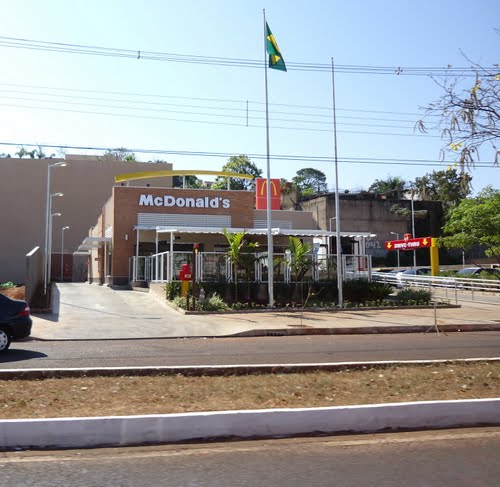 McDonald's na Avenida Rondon Pacheco, no centro de Uberlândia.